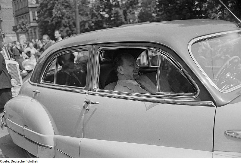 Original image description from the Deutsche Fotothek Portrait Walter Ulbrichts in einem PKW sitzend